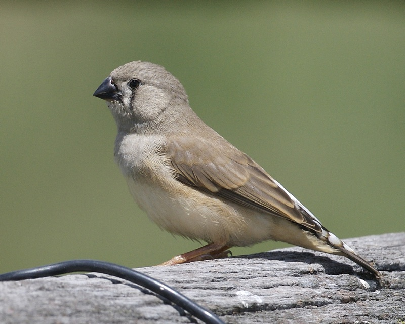 Australian Zebra Finch Taeniopygia guttata castanotis, juvenile